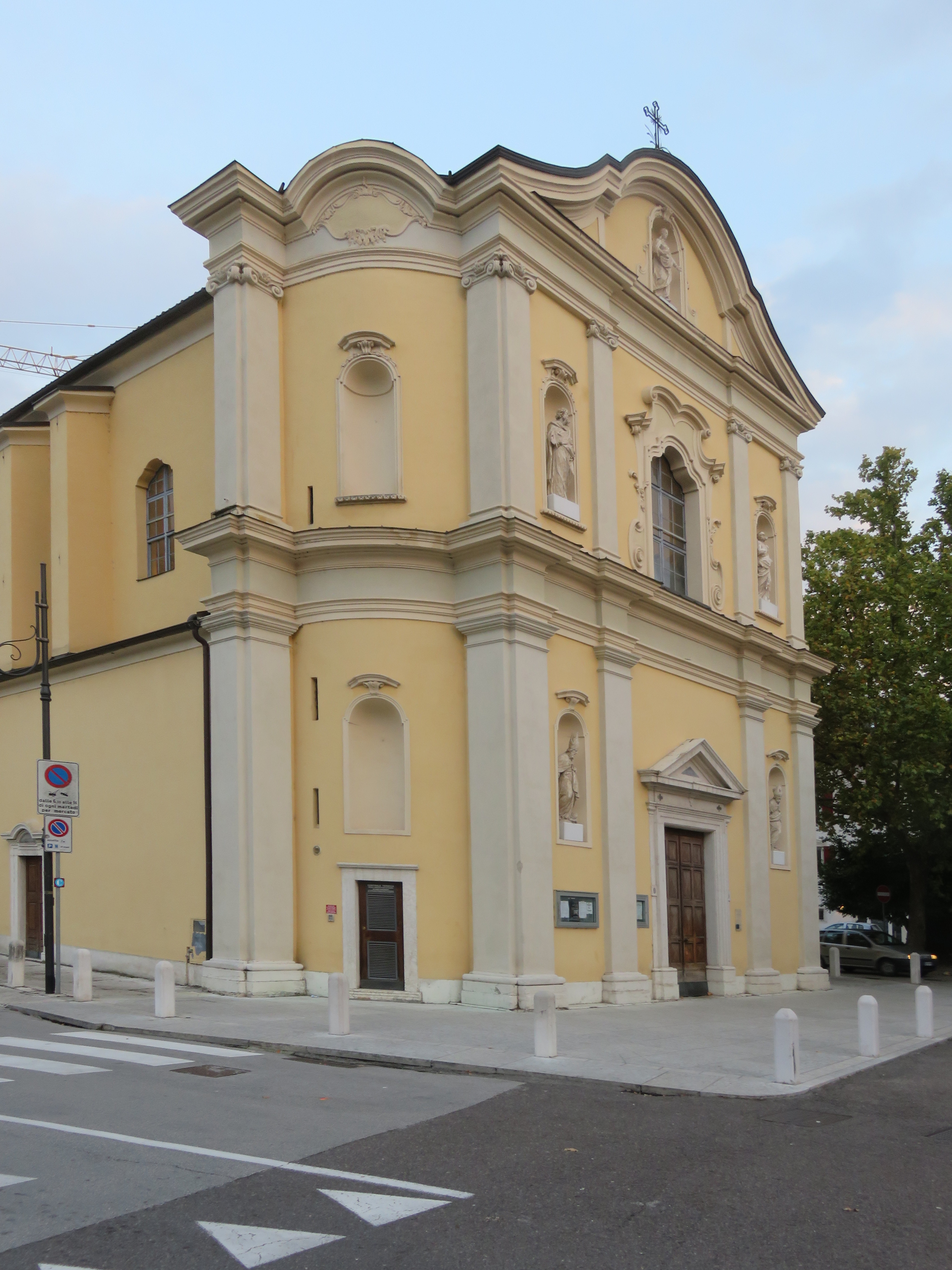 Altare maggiore